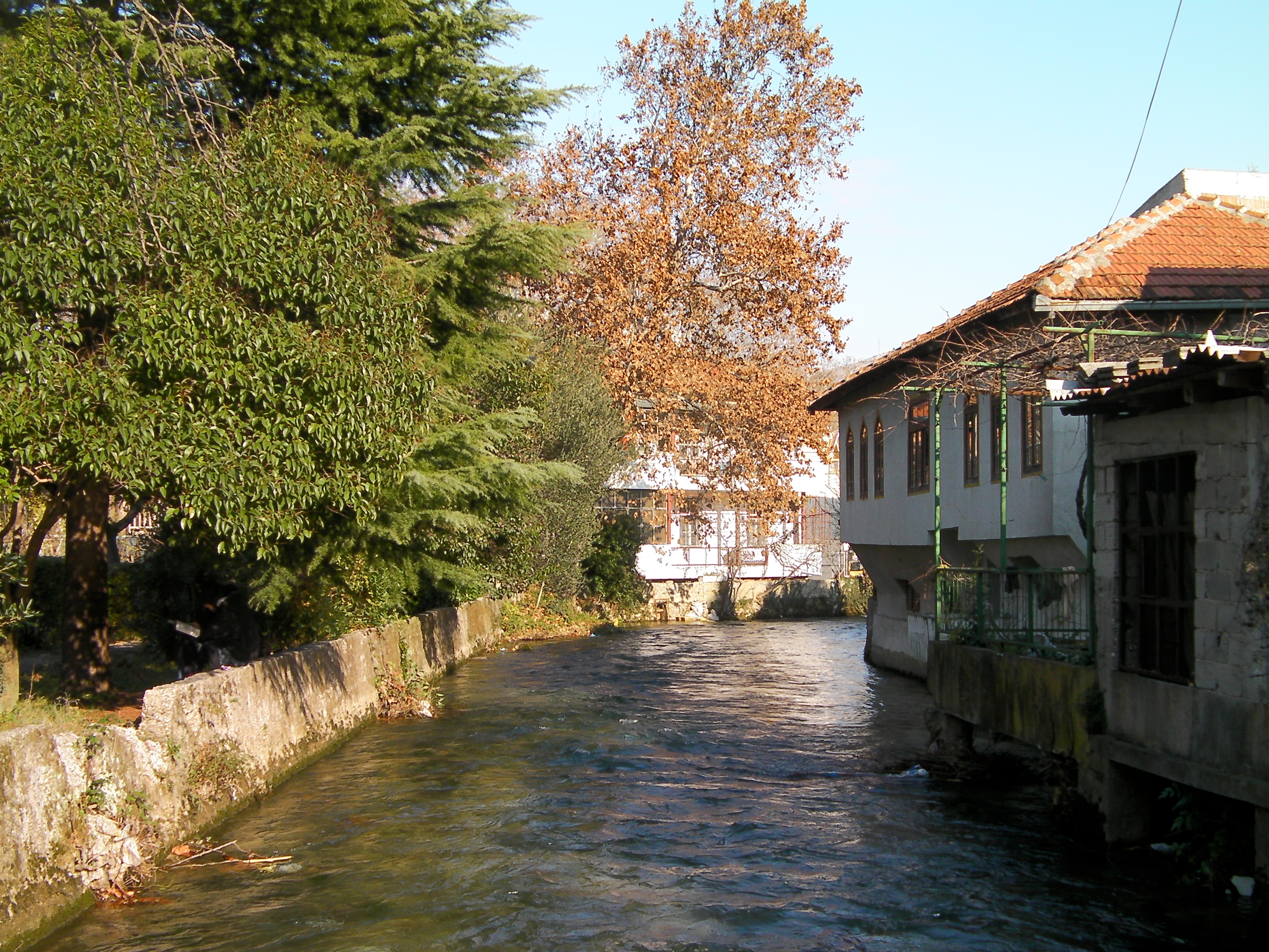 Radobolja, Mostar